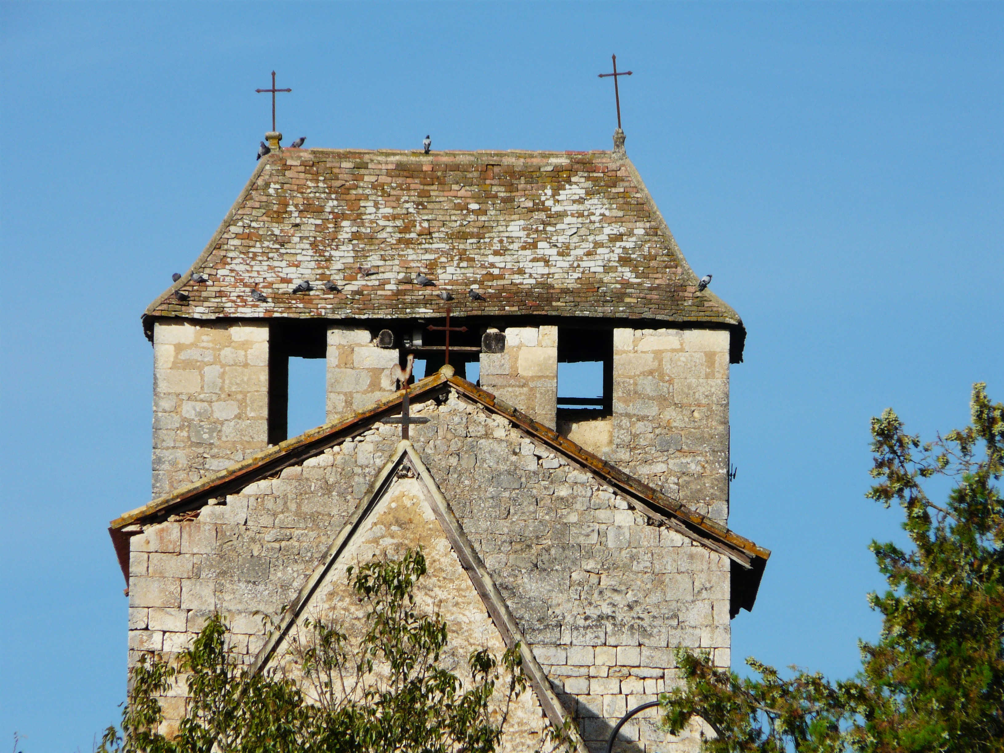 Le clocher de l'église Saint-Martin, Liorac-sur-Louyre, Dordogne, France.